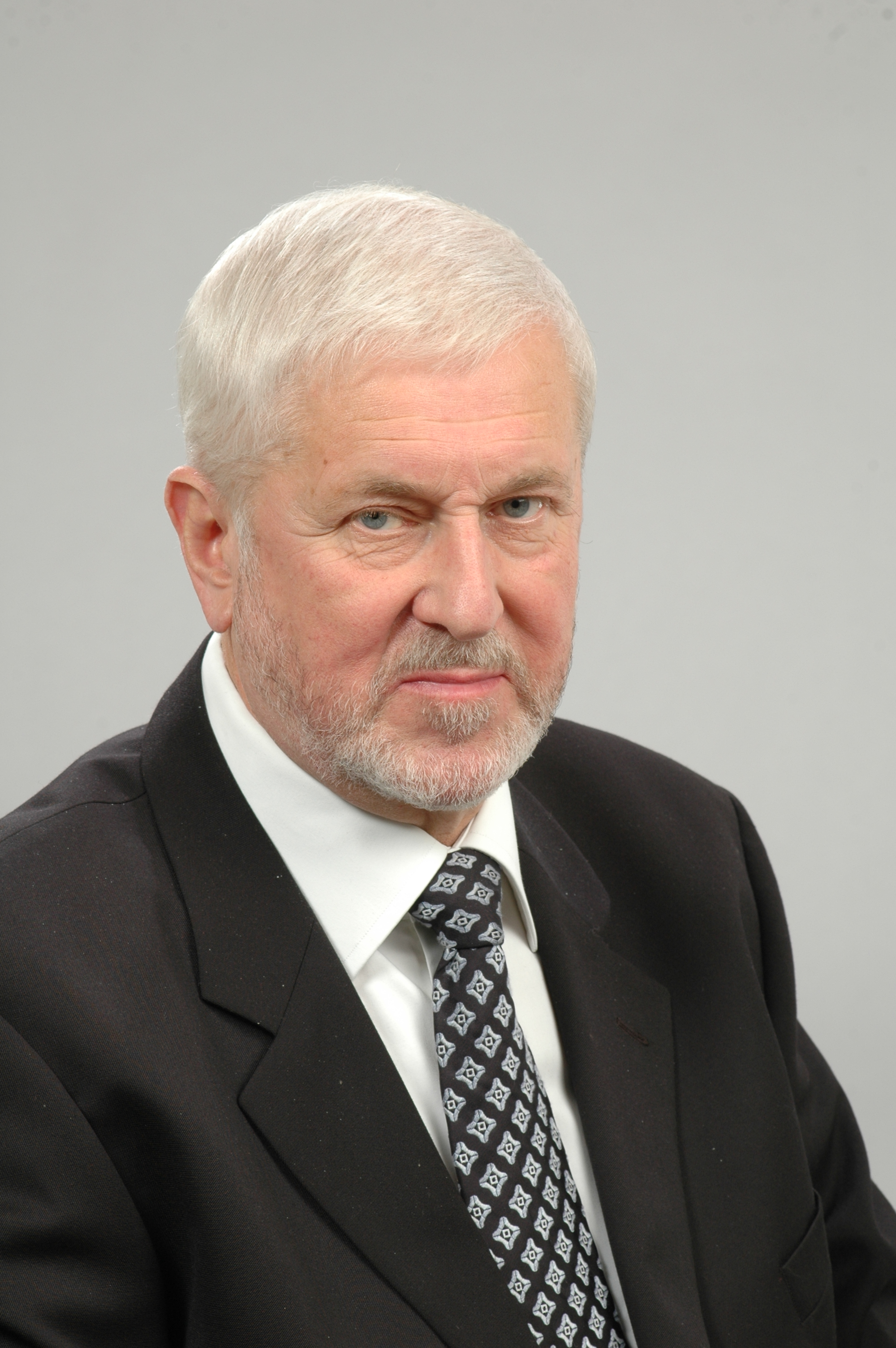 Foto: Saeima